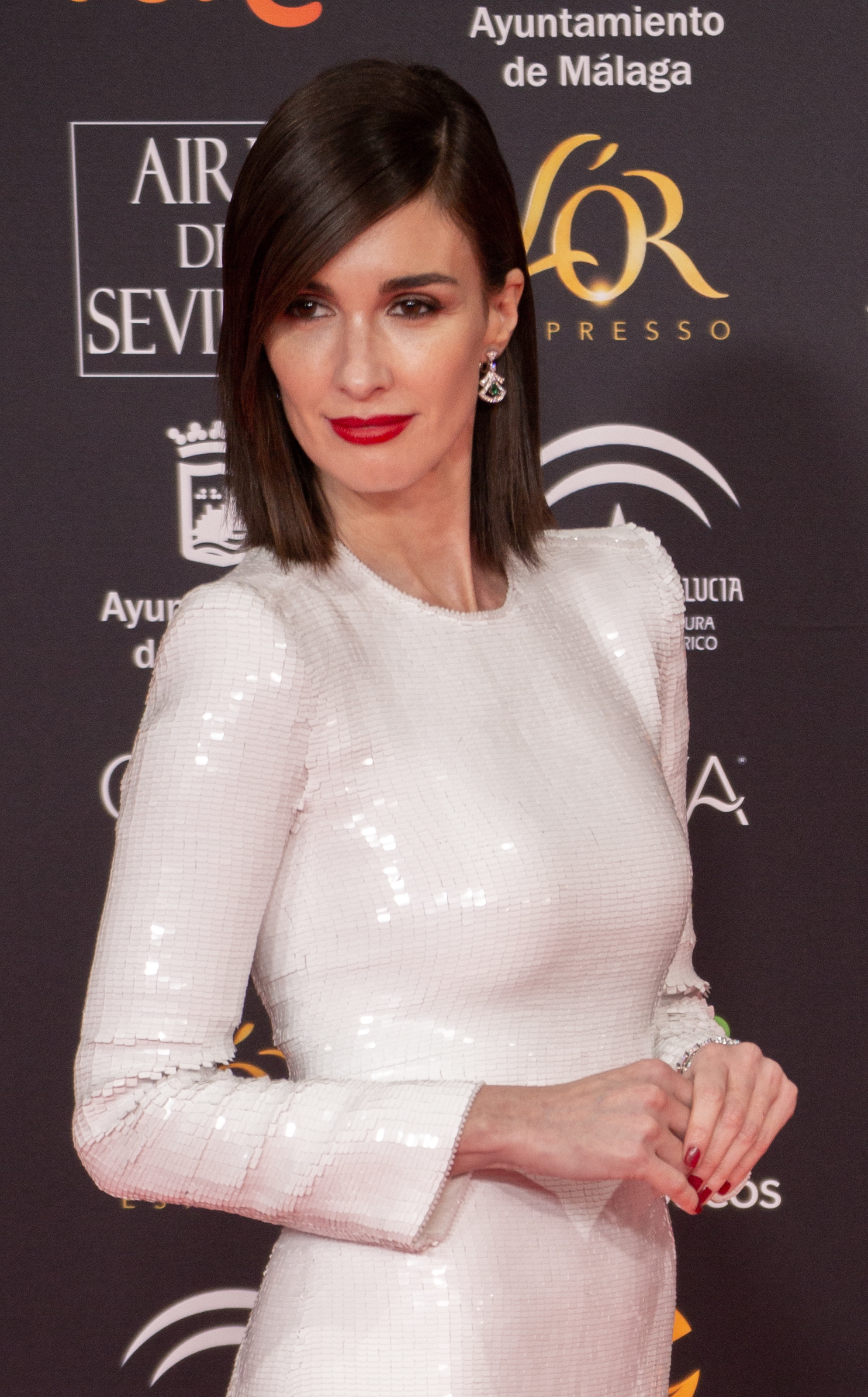 Paz Vega en la alfombra roja de la ceremonia de entrega de los Premios Goya 2020 celebrada en Málaga